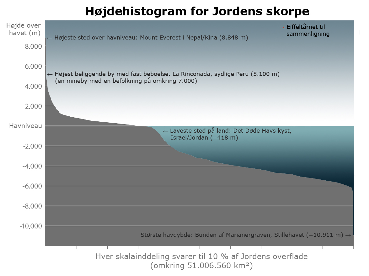 Højdehistogram for Jordens skorpe